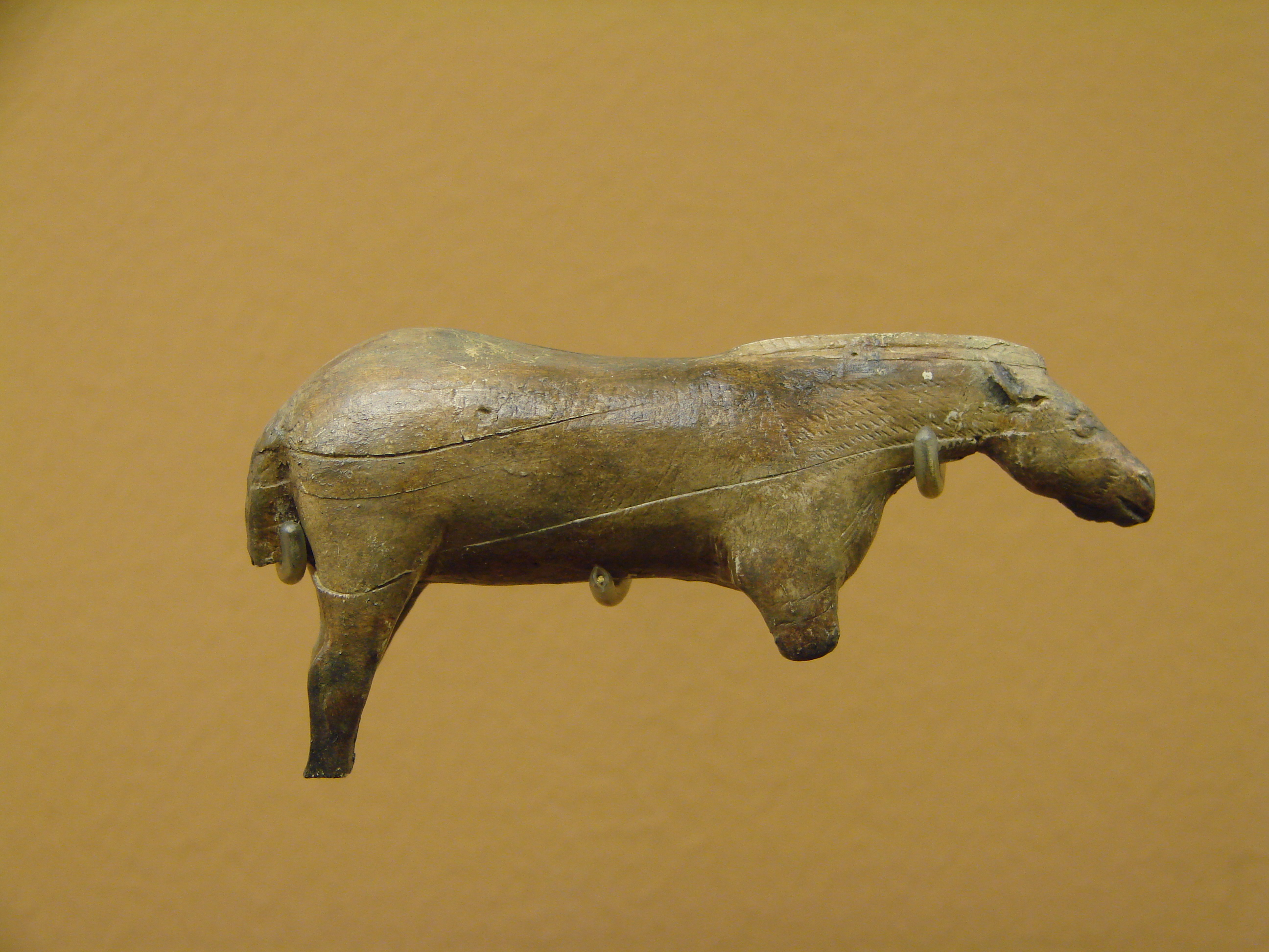 Cheval sculpté en ivoire (période paléolithique, magdalénien). Trouvé dans la Grotte des Espélugues à Lourdes. Exposé au Musée des Antiquités Nationales, Saint-Germain en Laye, France